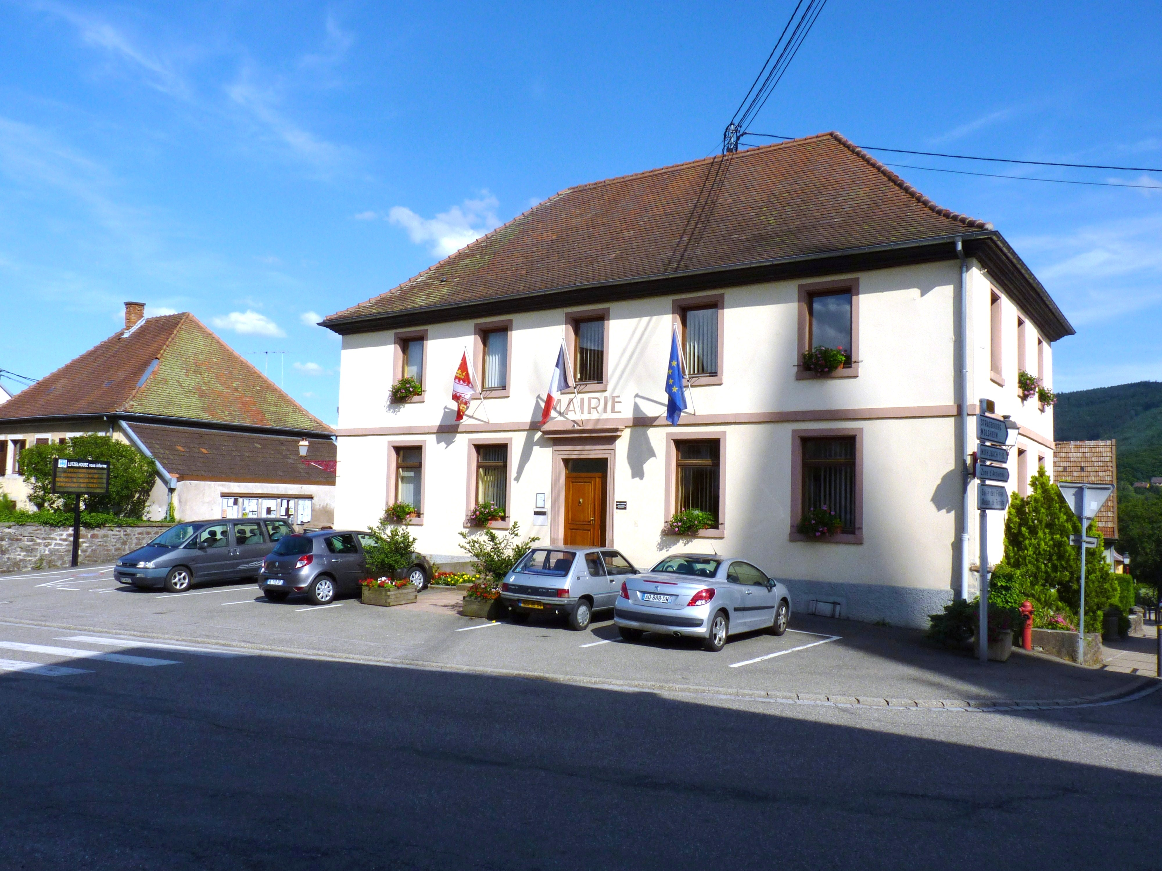 Mairie de Lutzelhouse